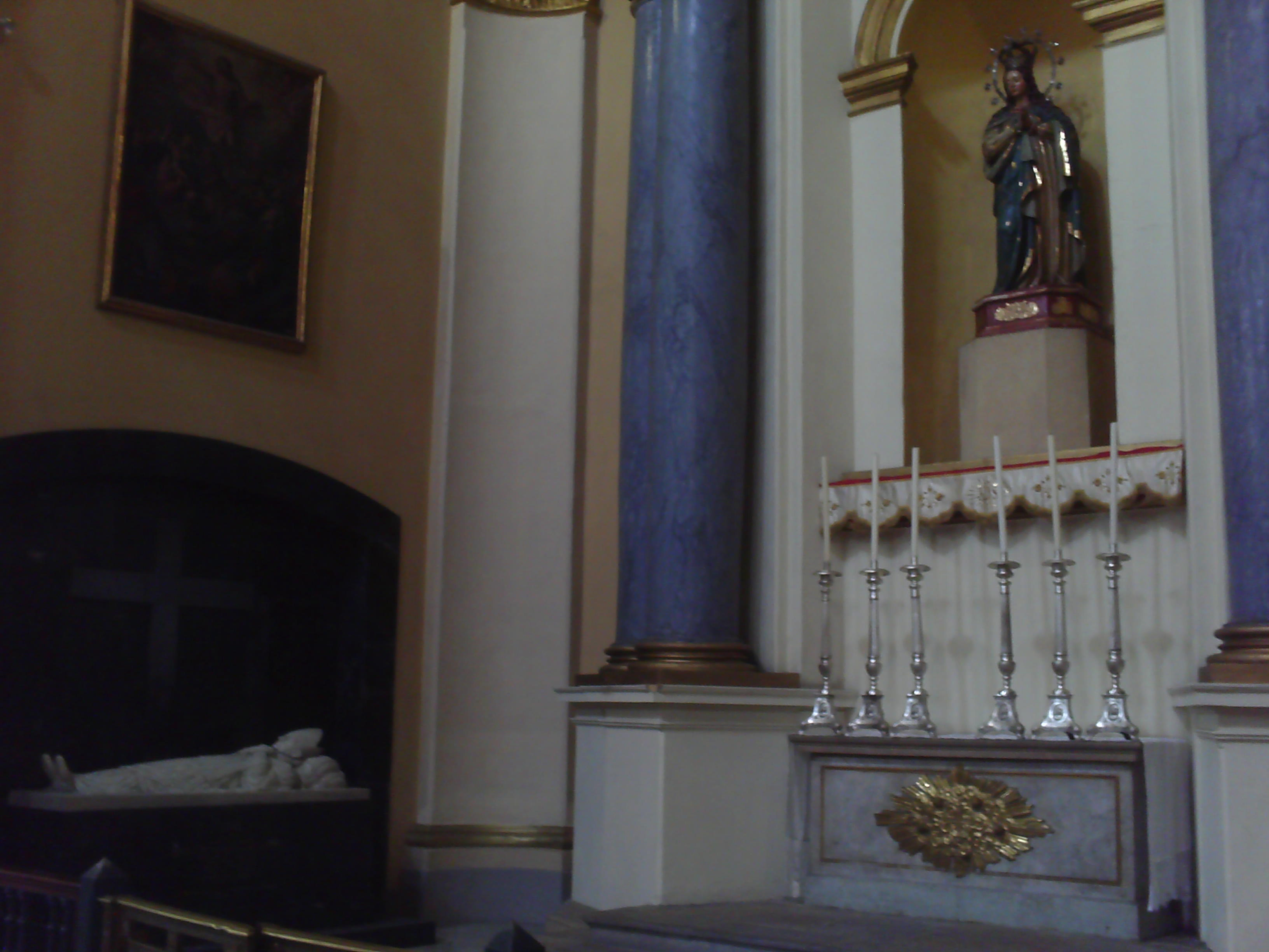 Catedral Primada de Colombia, Capilla de la Inmaculada Concepción (Bogotá)